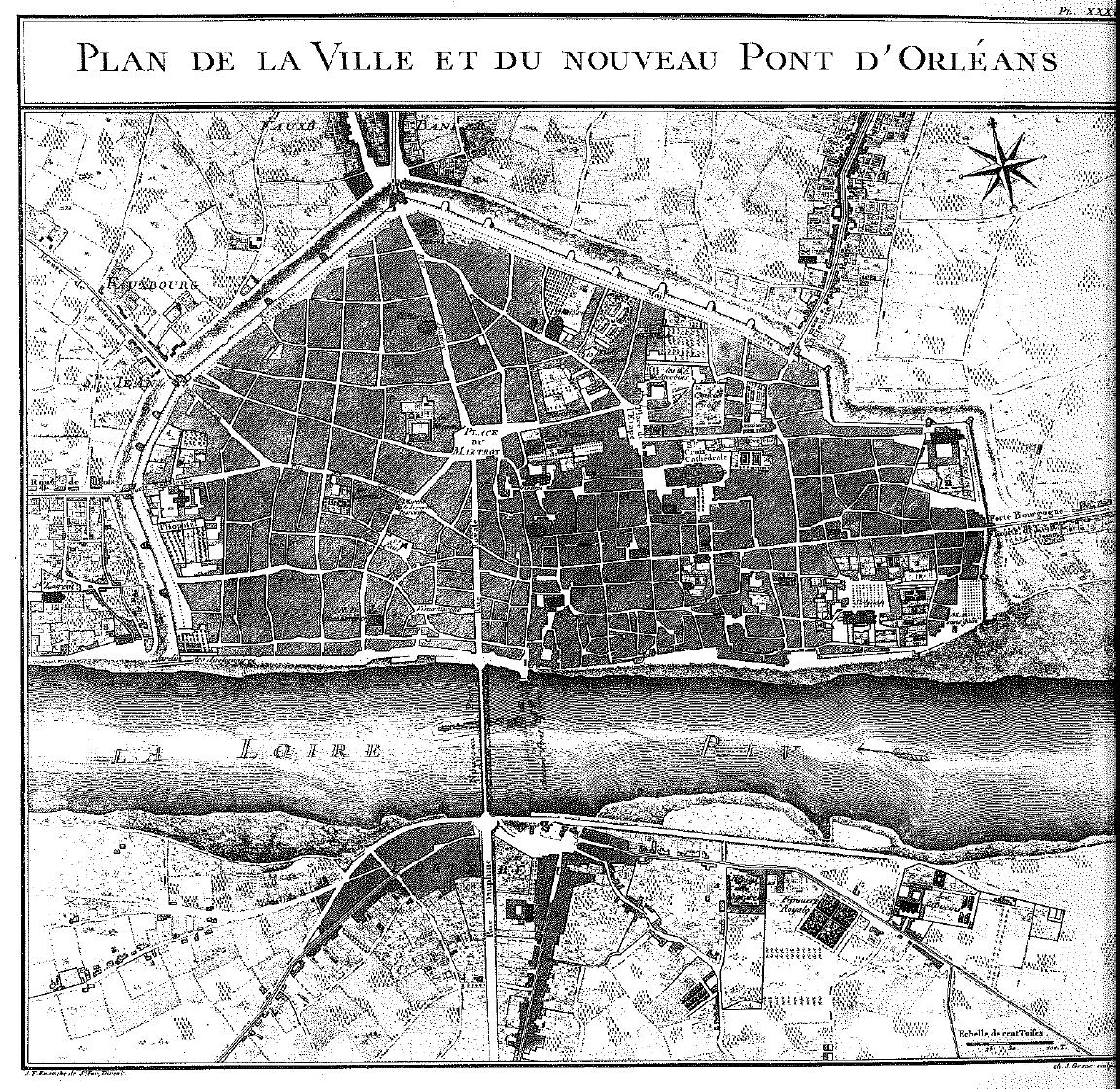 Plan de la ville d'Orléans en 1760, Loiret, France